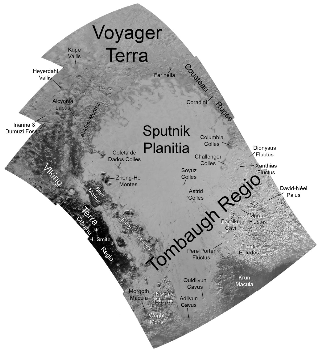 Annotated map of Sputnik Planitia on Pluto